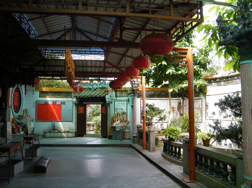 达濠青云岩大峰宝殿前